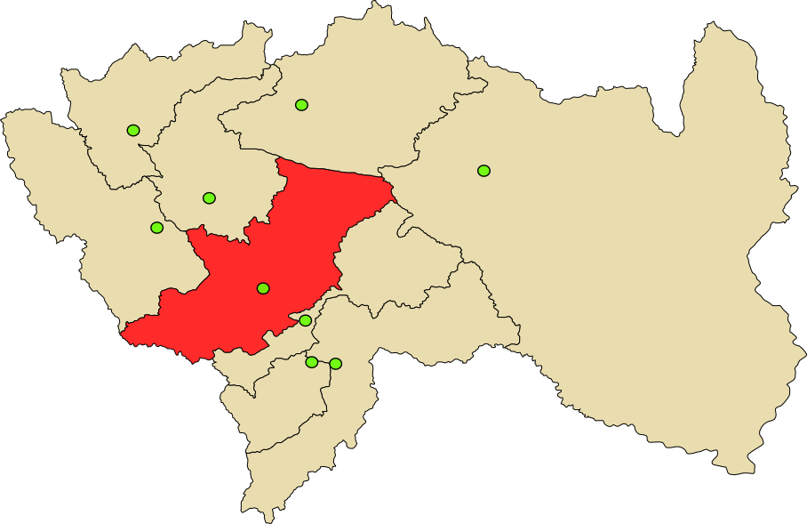 Mapa de Provincia de Jauja en Perú